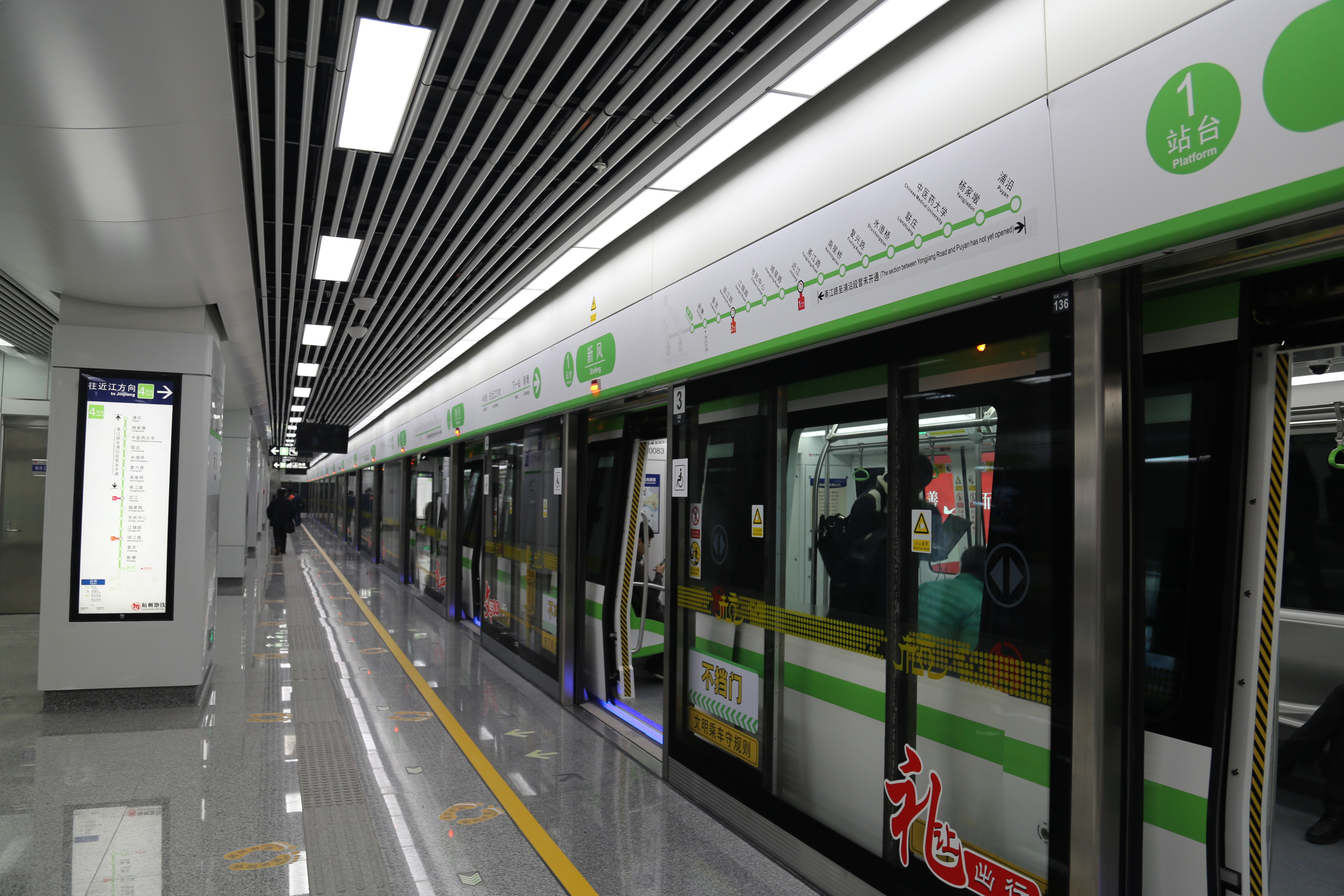 新风站1号站台